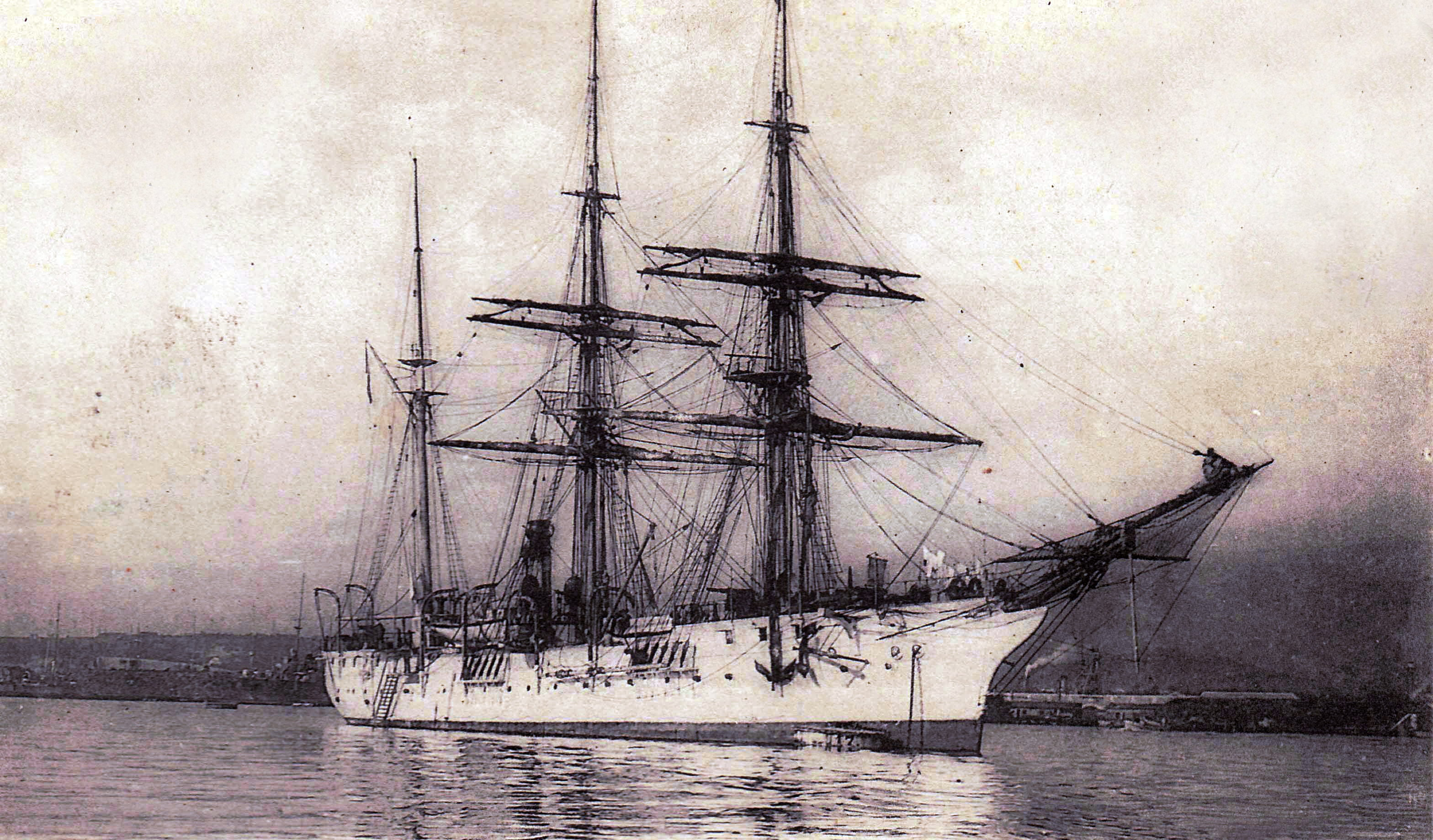 Le Vaucluse, aviso de transport de 1 600 tonneaux, dans les mers du Pacifique